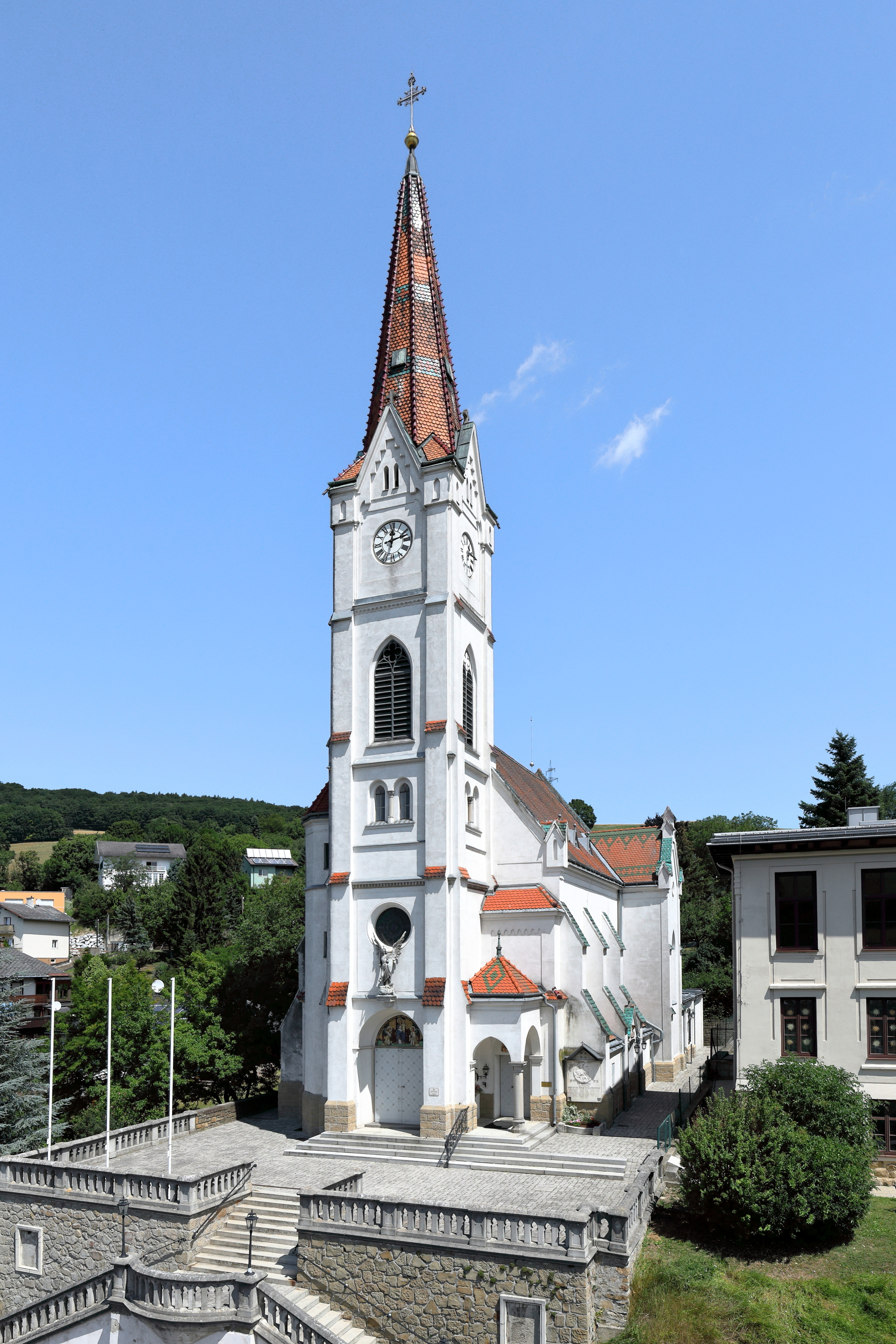 Südansicht der Pfarr- und Wallfahrtskirche Maria Königin der Engel in Maria Gugging, ein Ortsteil der niederösterreichischen Stadt Klosterneuburg.